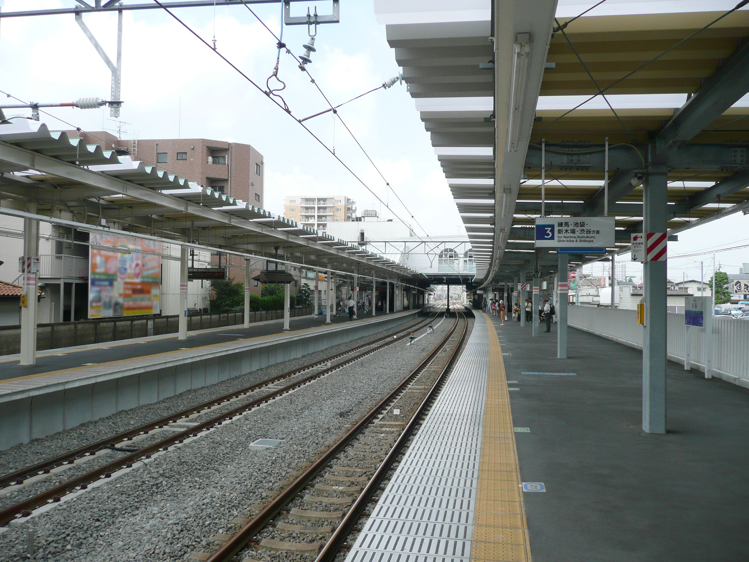 保谷駅ホーム